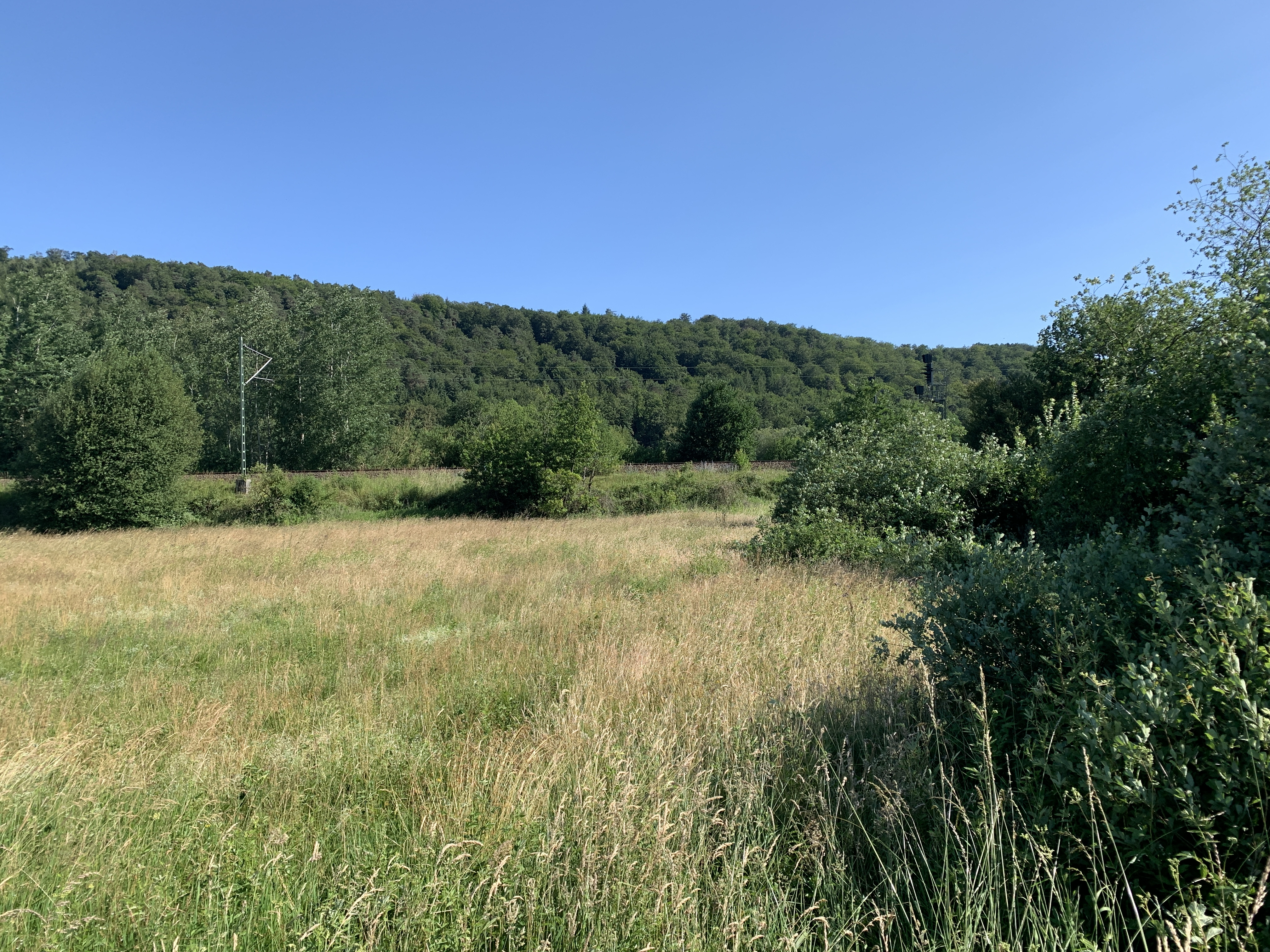 (NSG:RP-335089)_Naßwiese am Bahndamm